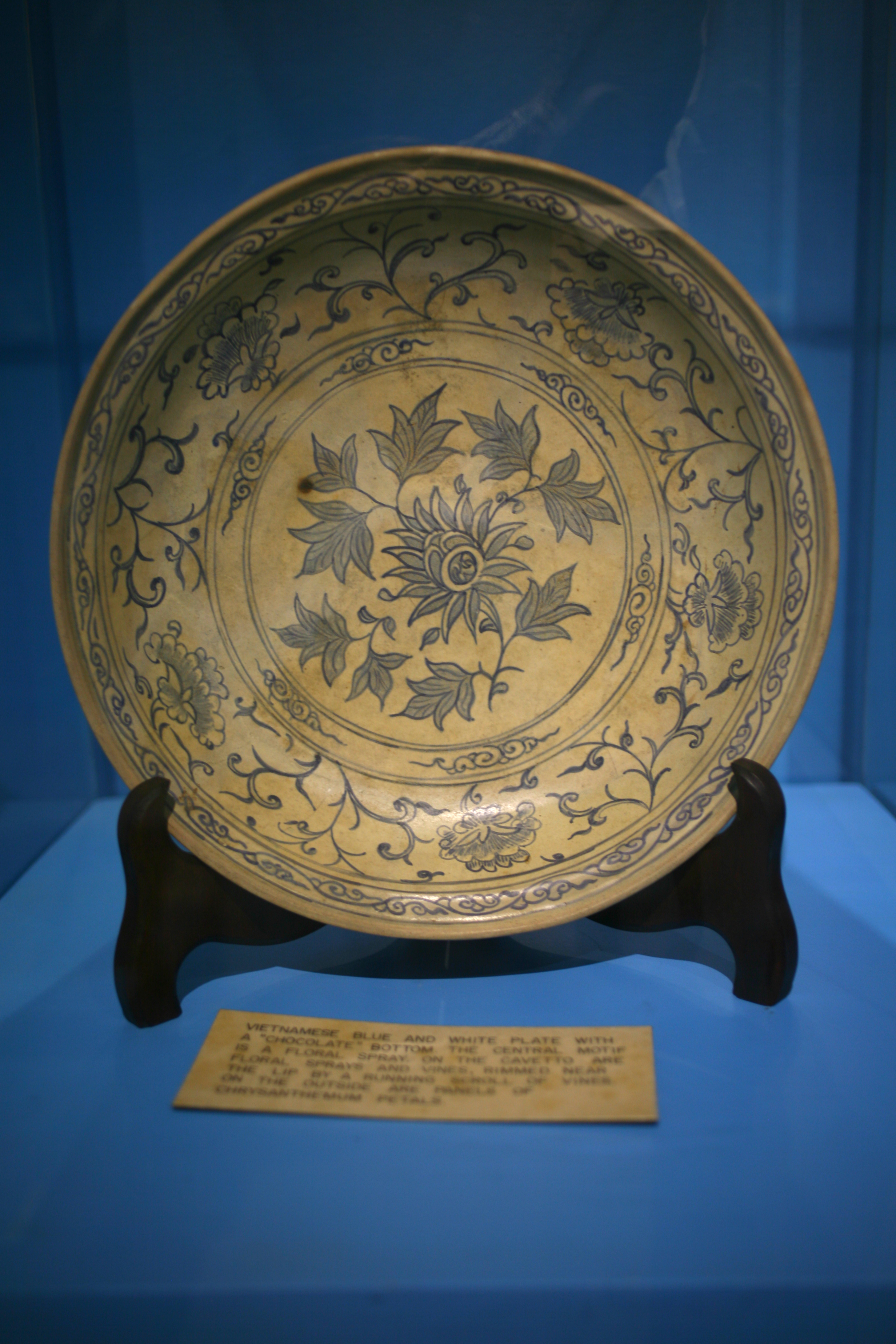 Museo nazionale di Butuan, Filippine